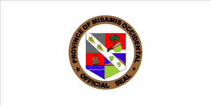 Dit materiaal is afkomstig van of en is door de auteur Jaume Ollé als GFDL beschikbaar gesteld, zie de toestemmingsemail. Hiermee vervallen de strictere voorwaarden in de disclaimers op de genoemde sites.Vrijgegeven bijdrage op Flags of the World van Jaume Olle. Zie deze verklaring op de Spaanstalige Wikipedia. GNU FDL